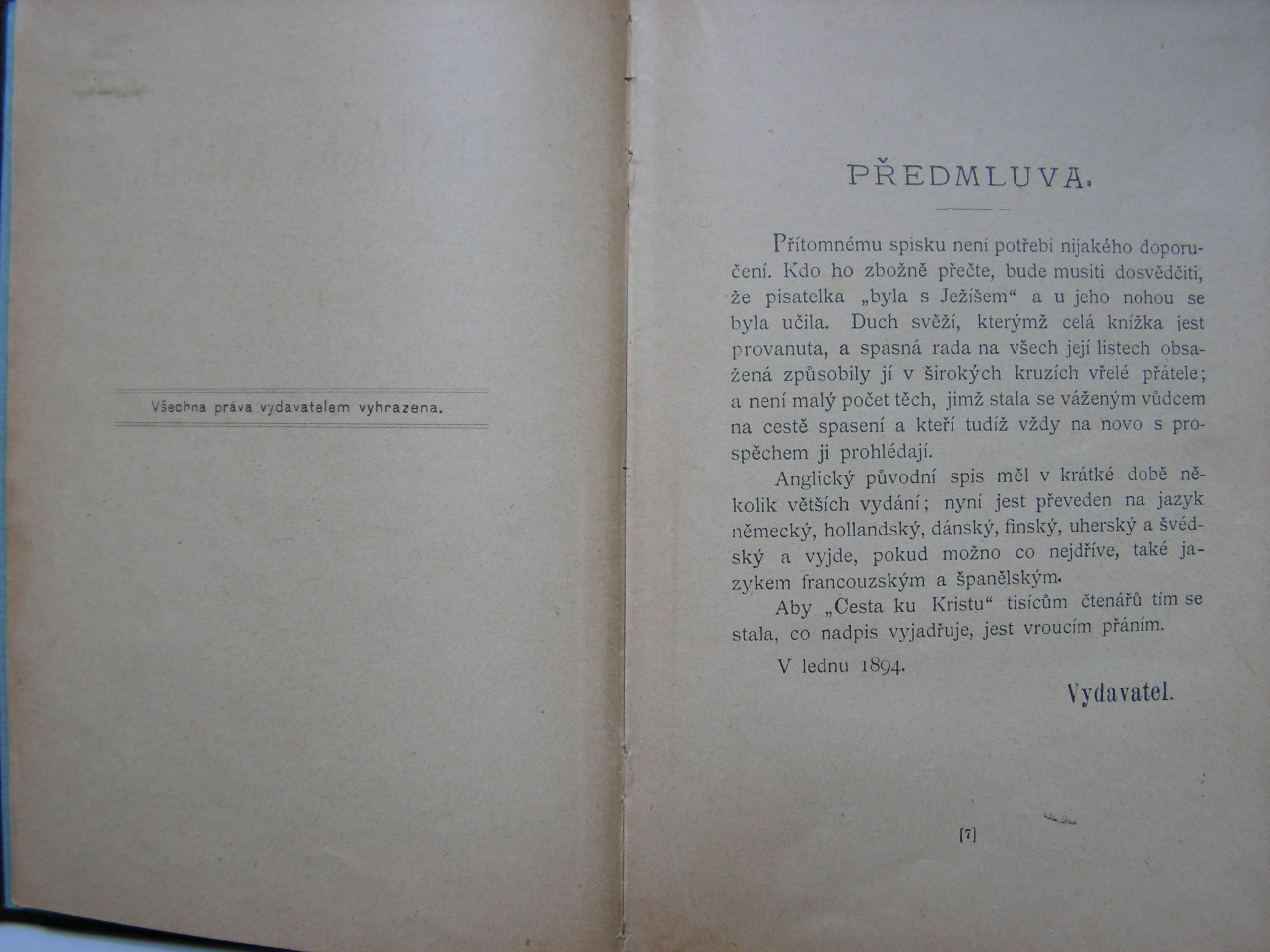 české vydání knihy